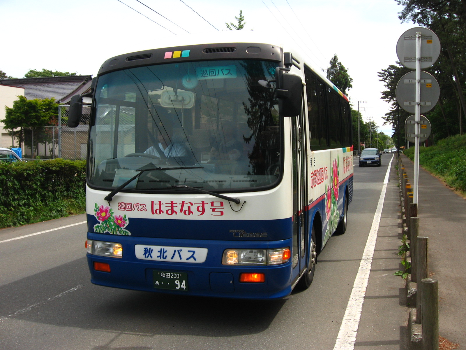 能代市巡回バス「はまなす号」